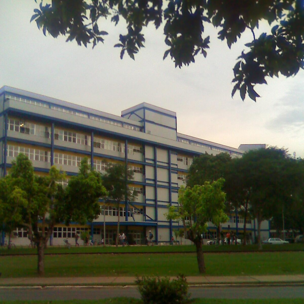 Universidade Federal de Viçosa, Minas Gerais, Brasil: Centro de Ciências Biológicas II